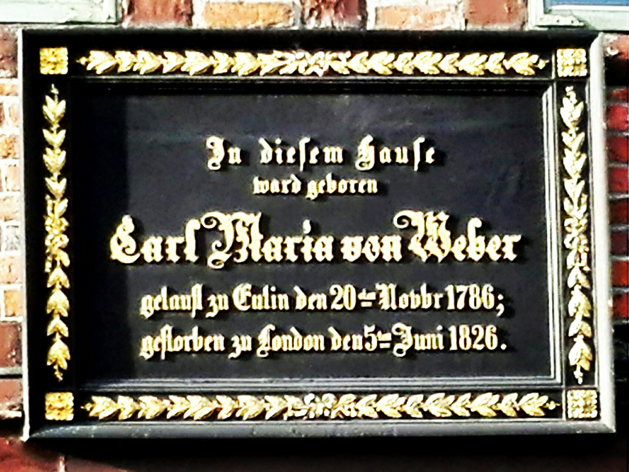 Plakette am Weberhaus in Eutin.